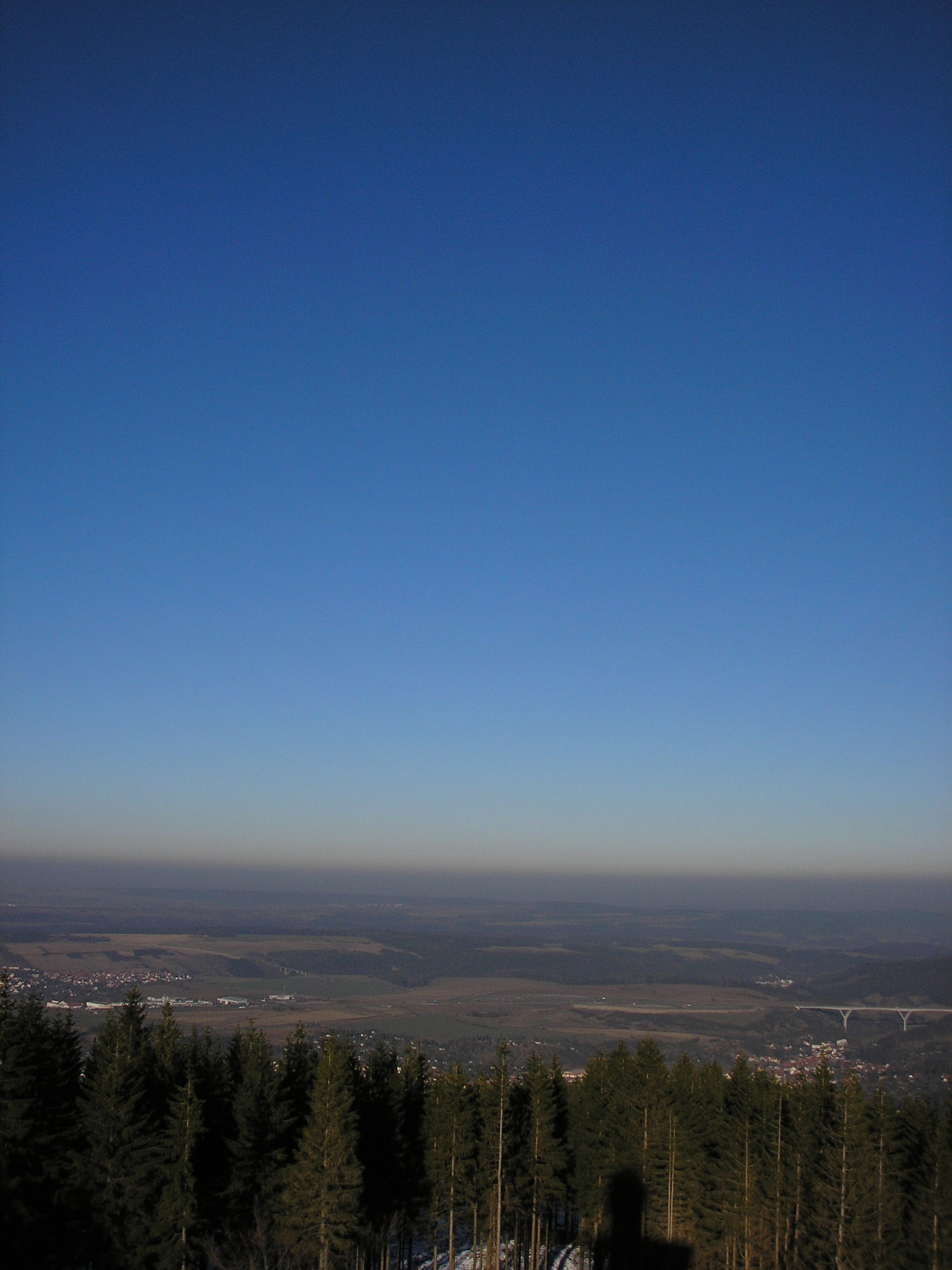 Die Luftverschmutzung im Winter über dem Thüringer Becken (fotografiert von der Hohen Warte bei Elgersburg, Blick nach Nordosten Richtung Erfurt).